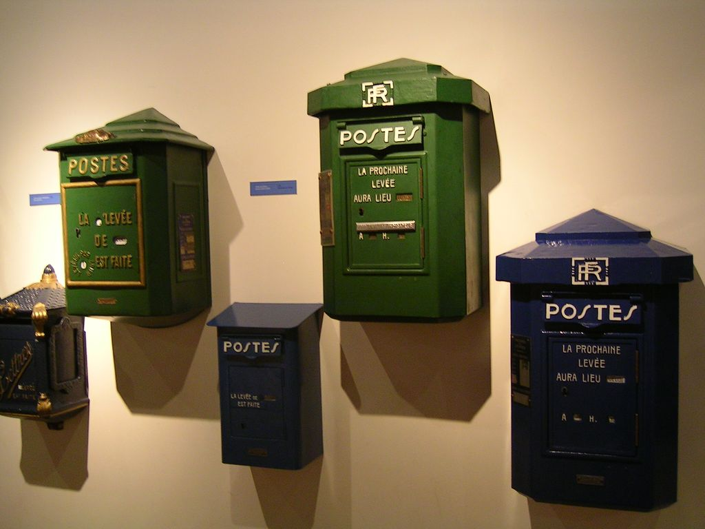 Anciennes boîtes aux lettres françaises Photo personnelle (own work) de Marianna